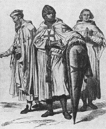 Caballeros Hospitalarios de San Juan de Jerusalén